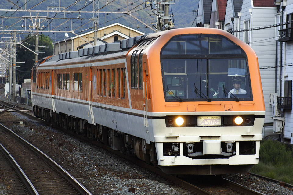 JR西日本のジョイフルトレイン、ゴールデンエクスプレスアストル(2007年3月8日付けで廃車) 投稿者特急ソニックが撮影 2006/09/25 JR西日本東海道本線山科駅にて